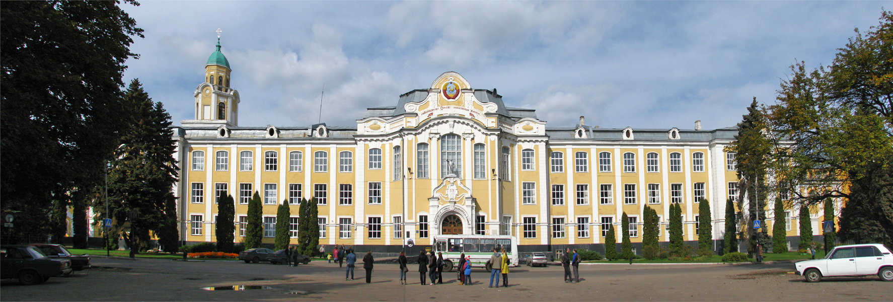 Воронежский Государственный Университет им. К.Д.Глинки